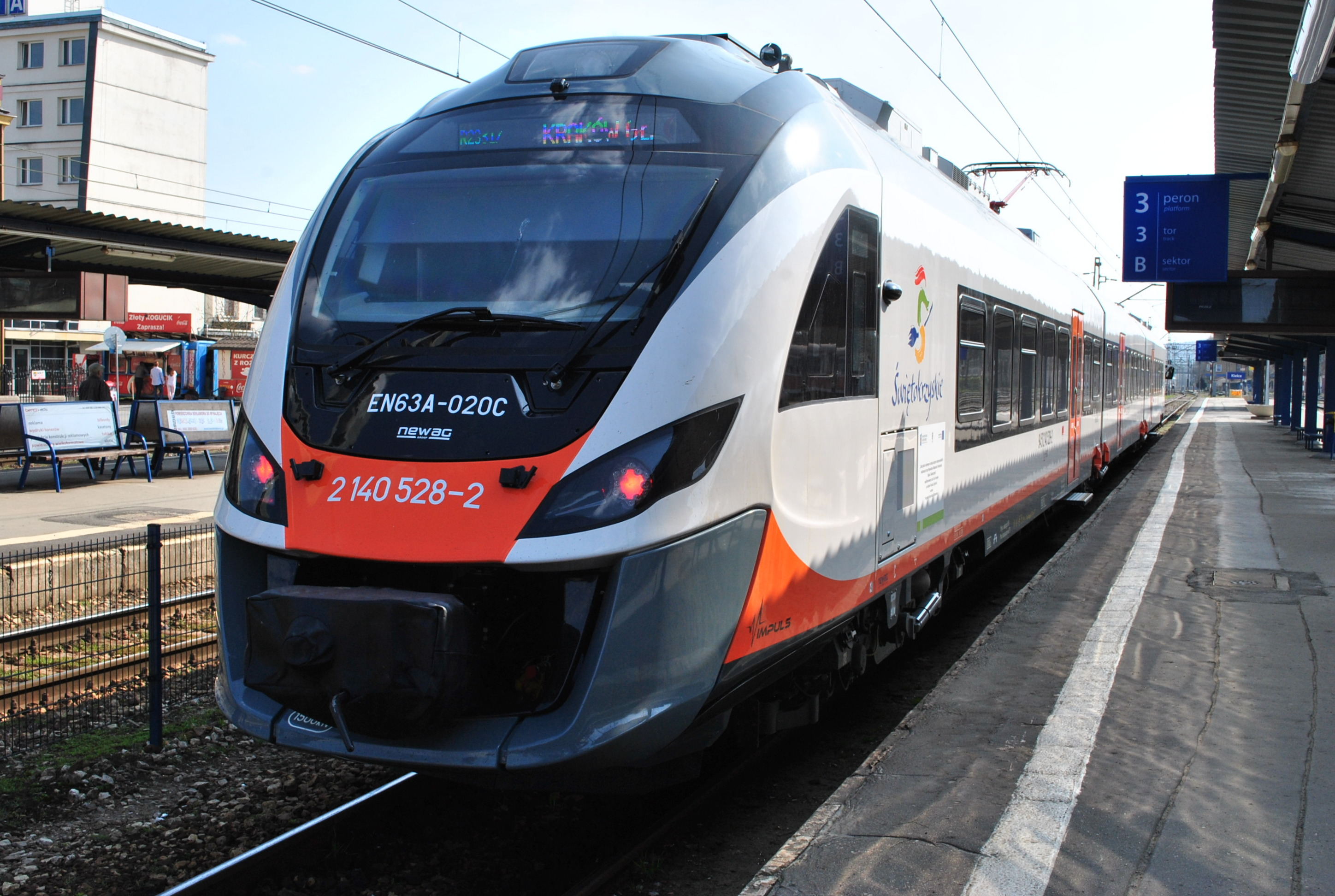 EN63A (Newag Impuls) na stacji Kielce